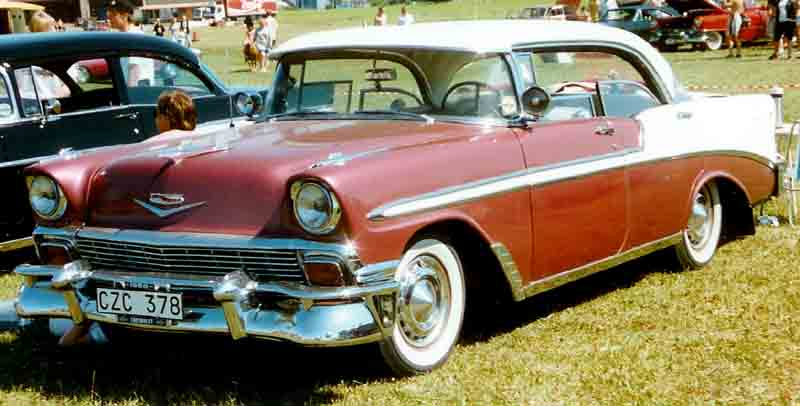 Chevrolet Bel Air 4-Door HT 1956